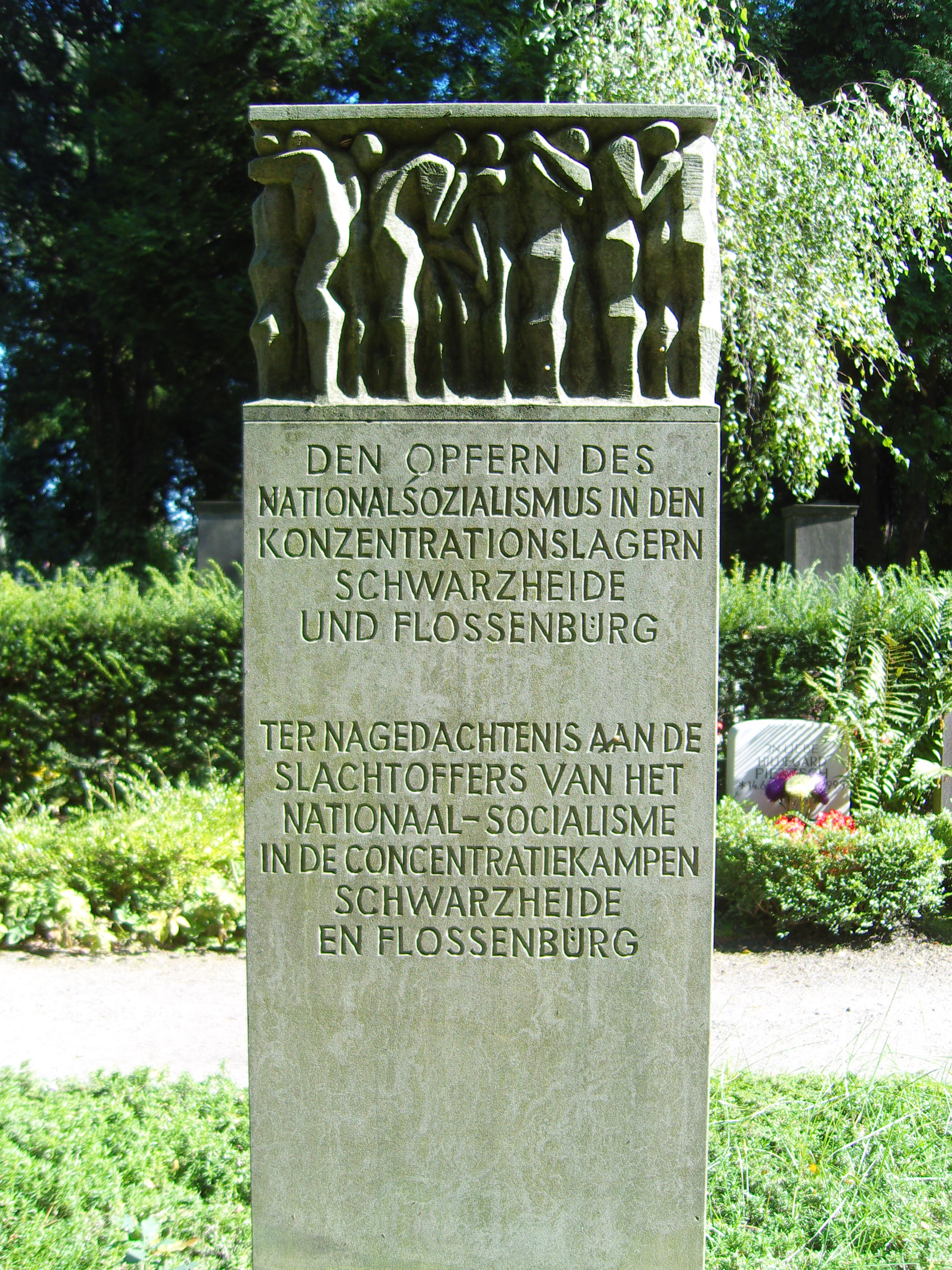 Gedenkstätte für die Opfer der Konzentrationslager in Flossenbürg und Schwarzheide auf dem Urnenheide Tolkewitz in Dresden